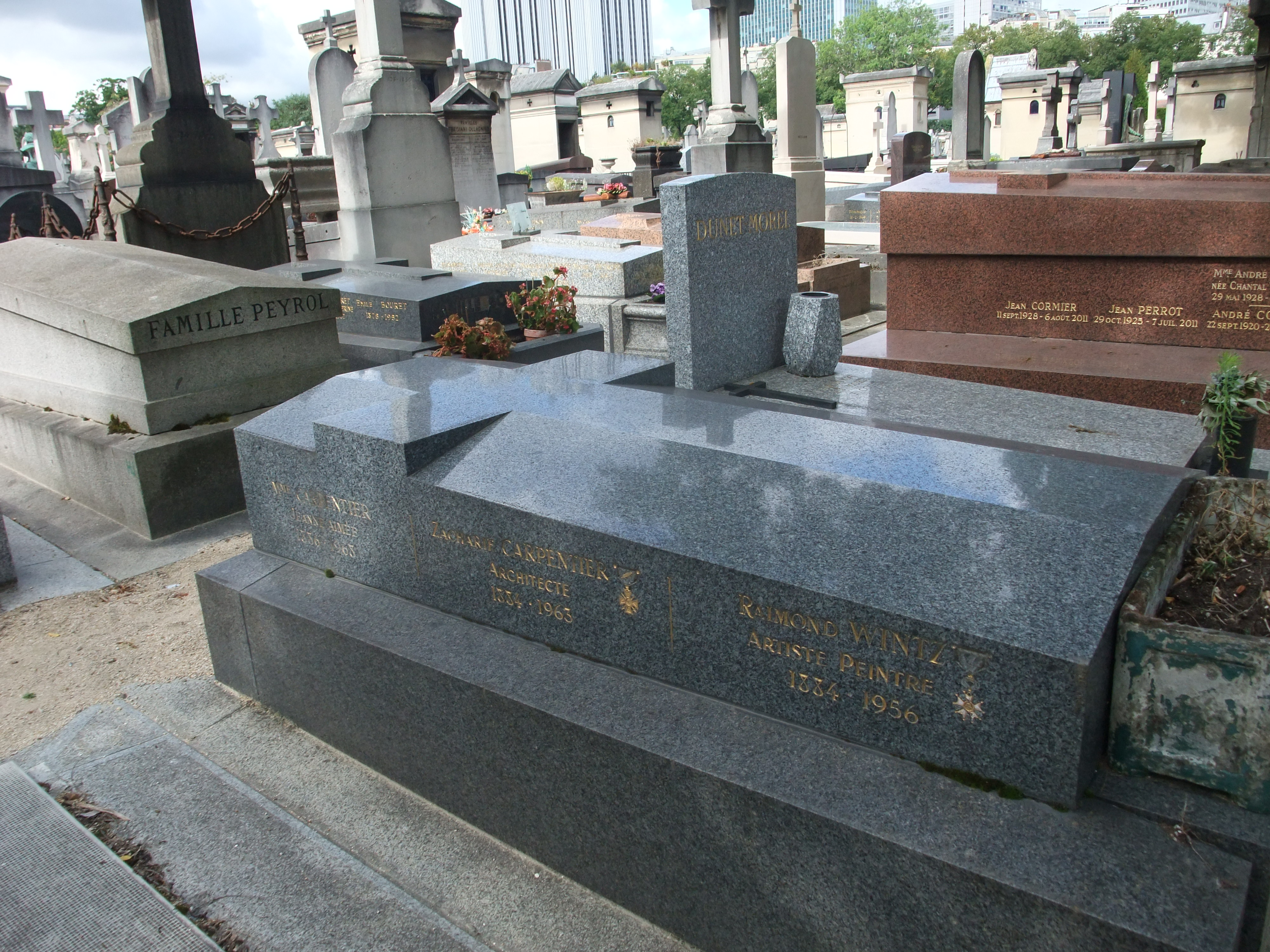 tombe de Raymond Wintz, cimetière du Montparnasse, Paris